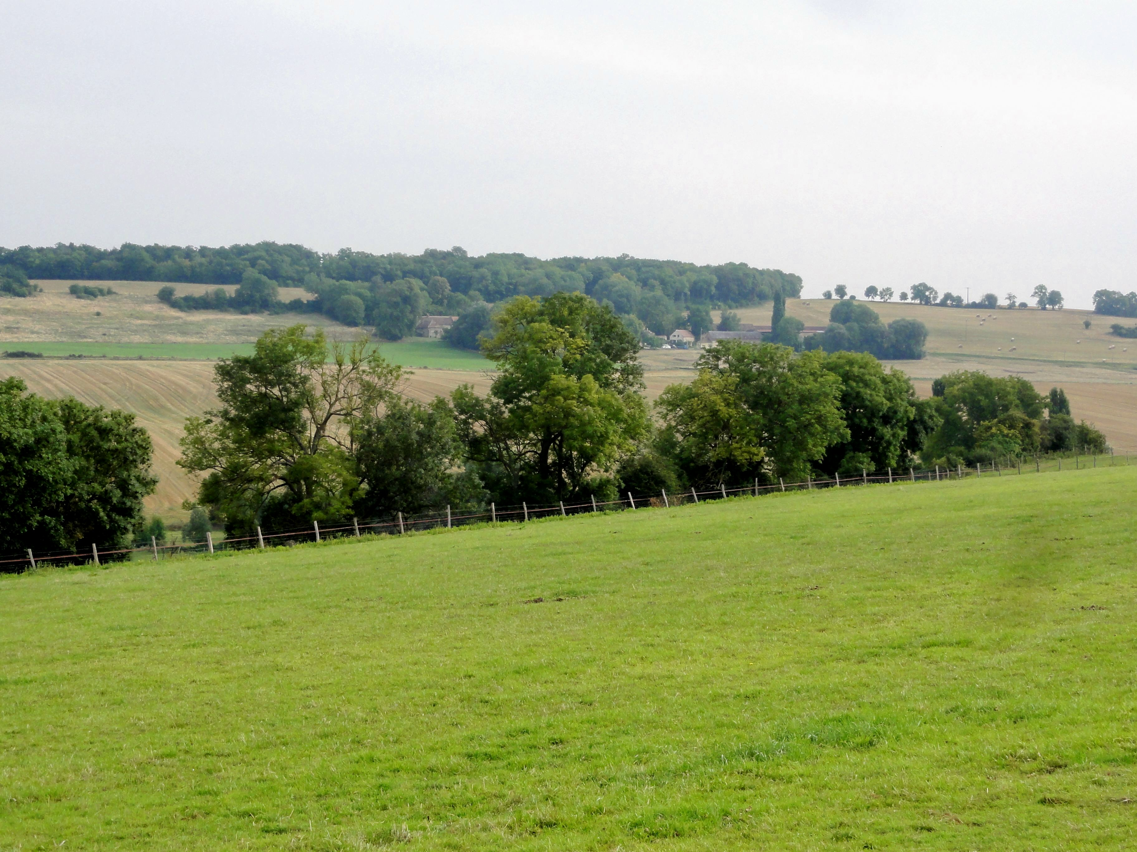 Paysage près du hameau de Buchet.